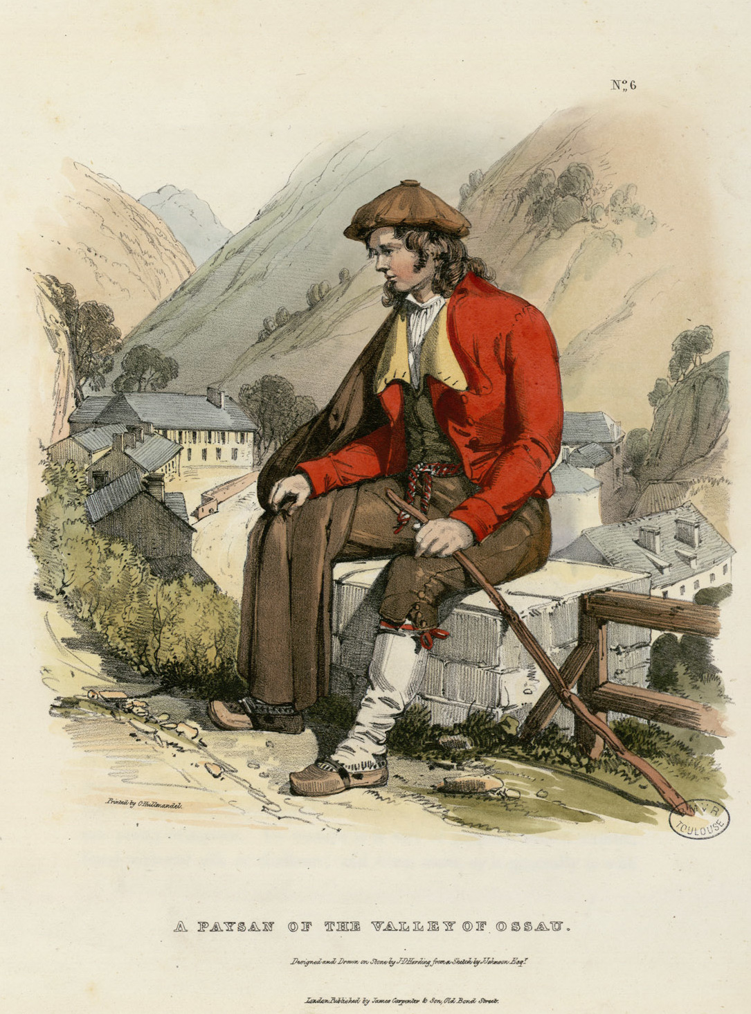 Notice jointe : "To be published by subscription, in royal quarto, the Costumes of the French Pyrenees : consisting of Thirty Drawings of the Male and Female Peasantry of the Pyrenean Valleys, with a characteristic Background. Copied from the Sketches of J. Johnson, Esq.r; drawn on Stone by J. D. Harding; coloured, and accompanied by a Letter-press Description. The work will be published in six parts, each containing five plates. Price of each part : twelve shillings." Ancely, René (1876 - 1966). Possesseur